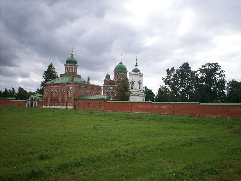 Спасо-Бородинский женский монастырь